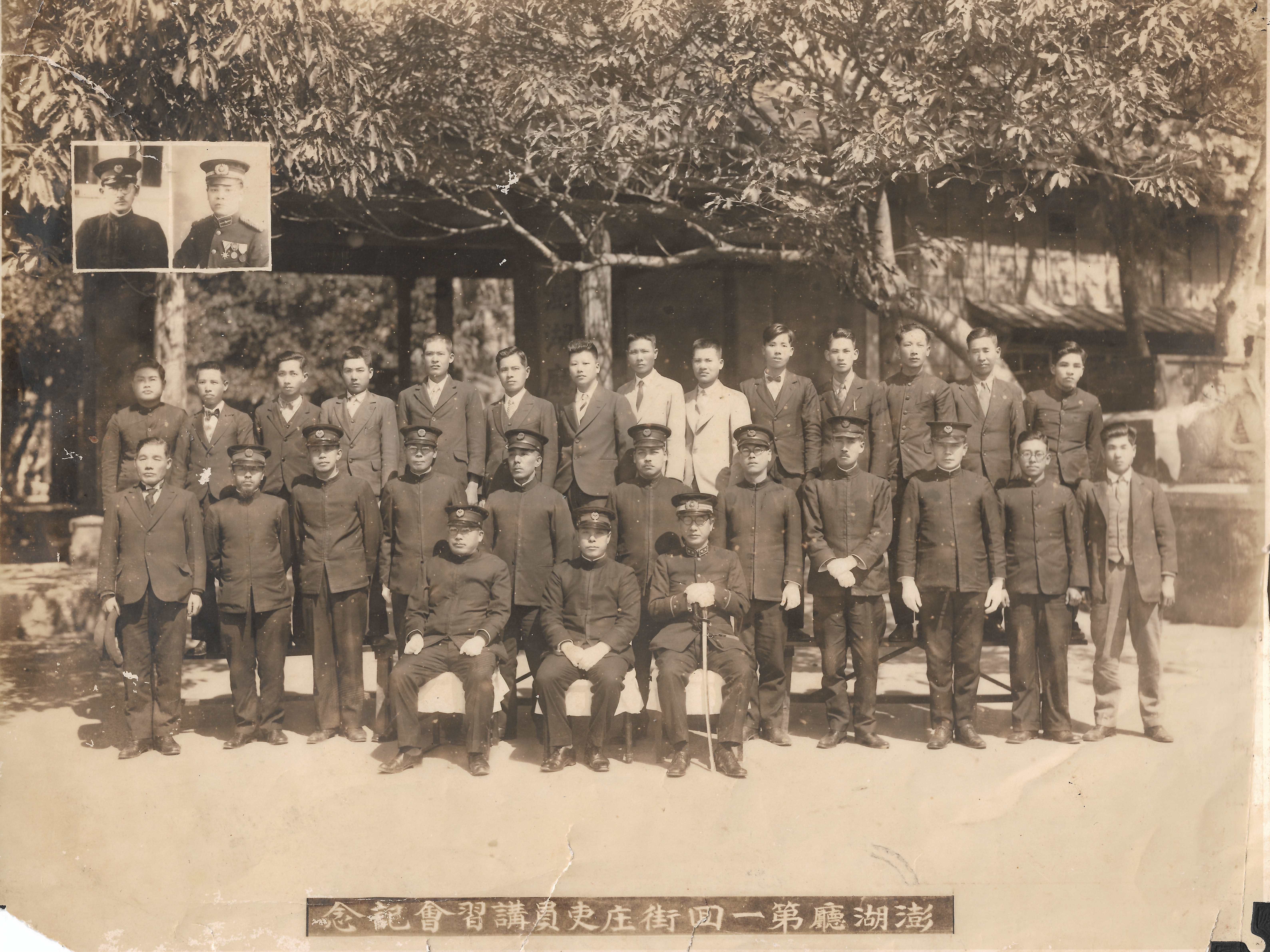 澎湖廳第一回街庄吏員員講習會紀念。前排為日本官員，後排多為台灣籍雇員。後排左起第七位即鄭大洽，後來的澎湖縣議會第一屆民選議長。